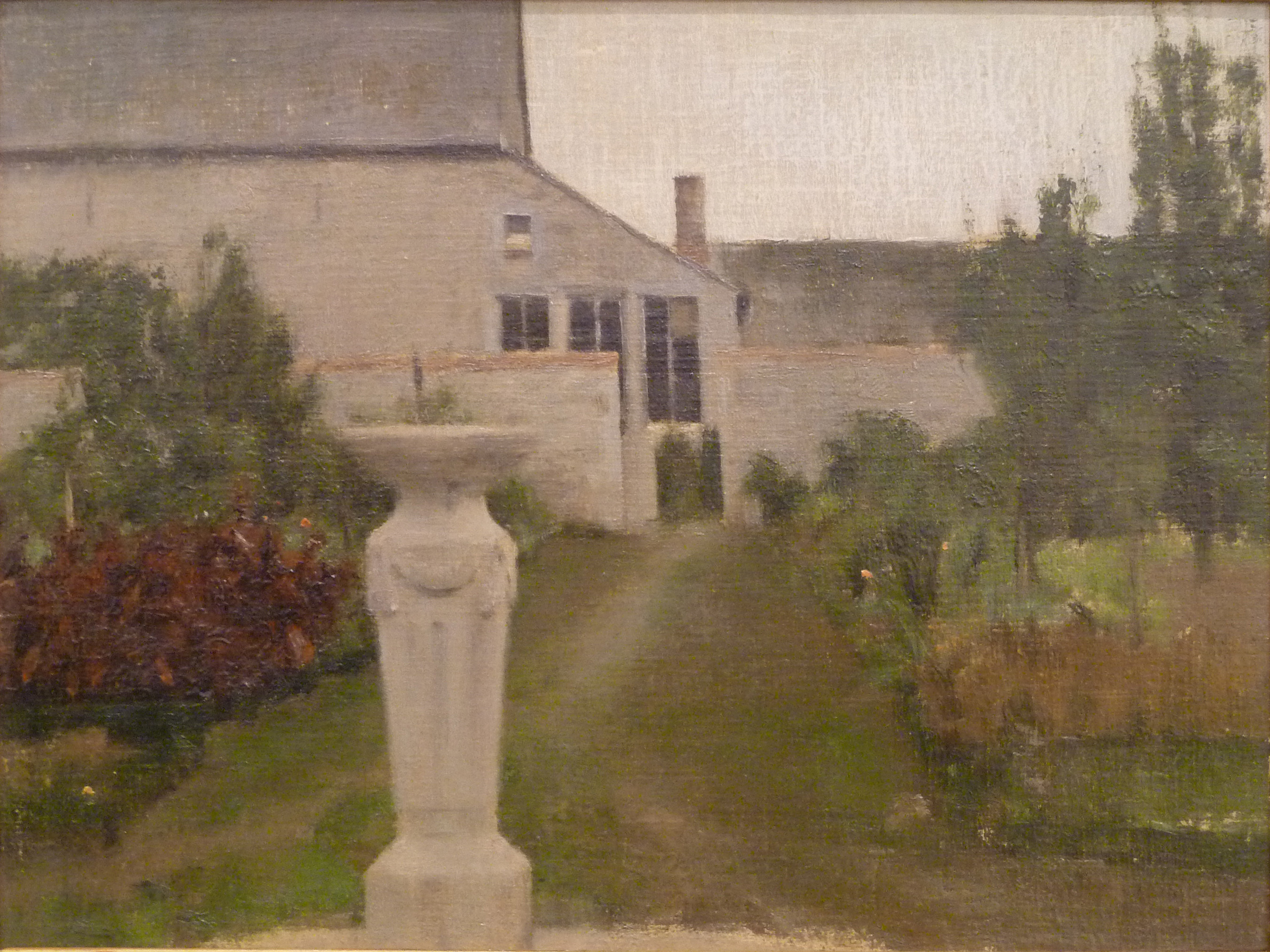 De tuin (1886), olieverf op doek door Fernand Khnopff (1858-1921); collectie Belfius Bank & Verzekeringen, Brussel, België